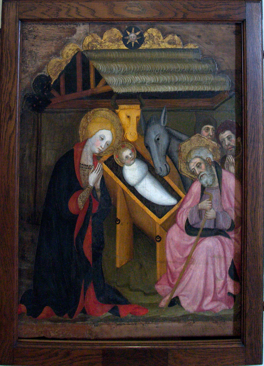 Taula de la "Nativitat" de l'església de Sant Pere de Cubelles (La Noguera, Catalunya), obra de Pere Serra (1400). Conservada al Museu de Maricel de Sitges